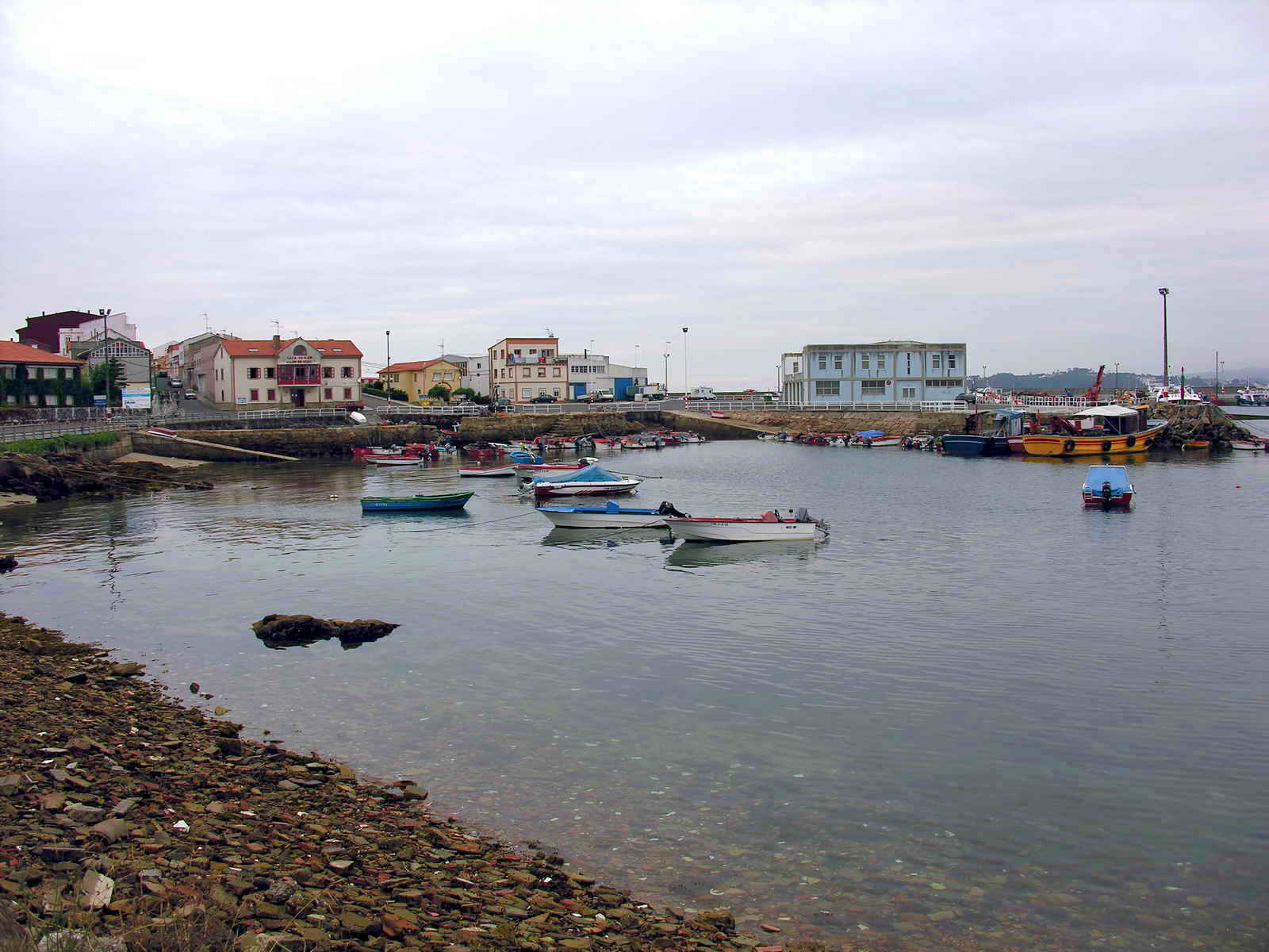 Boiro - Galicia - España (Spain)